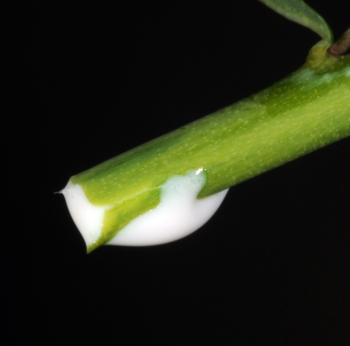 Saft einer Euphorbia spec., Pfungstädter Düne, Pfungstadt, Hessen, Deutschland